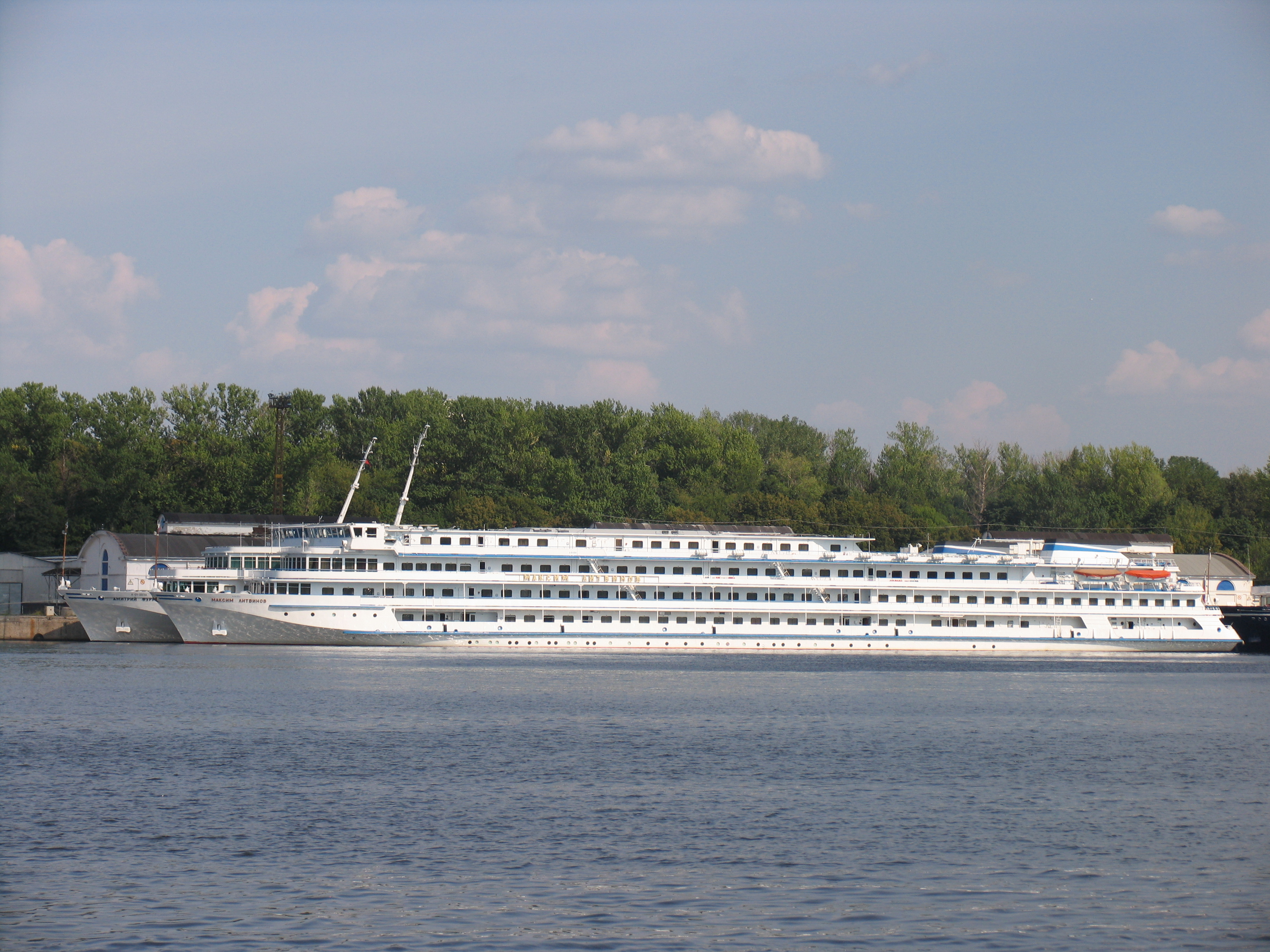 Теплоход "Максим Литвинов" у причала Северного речного вокзала.